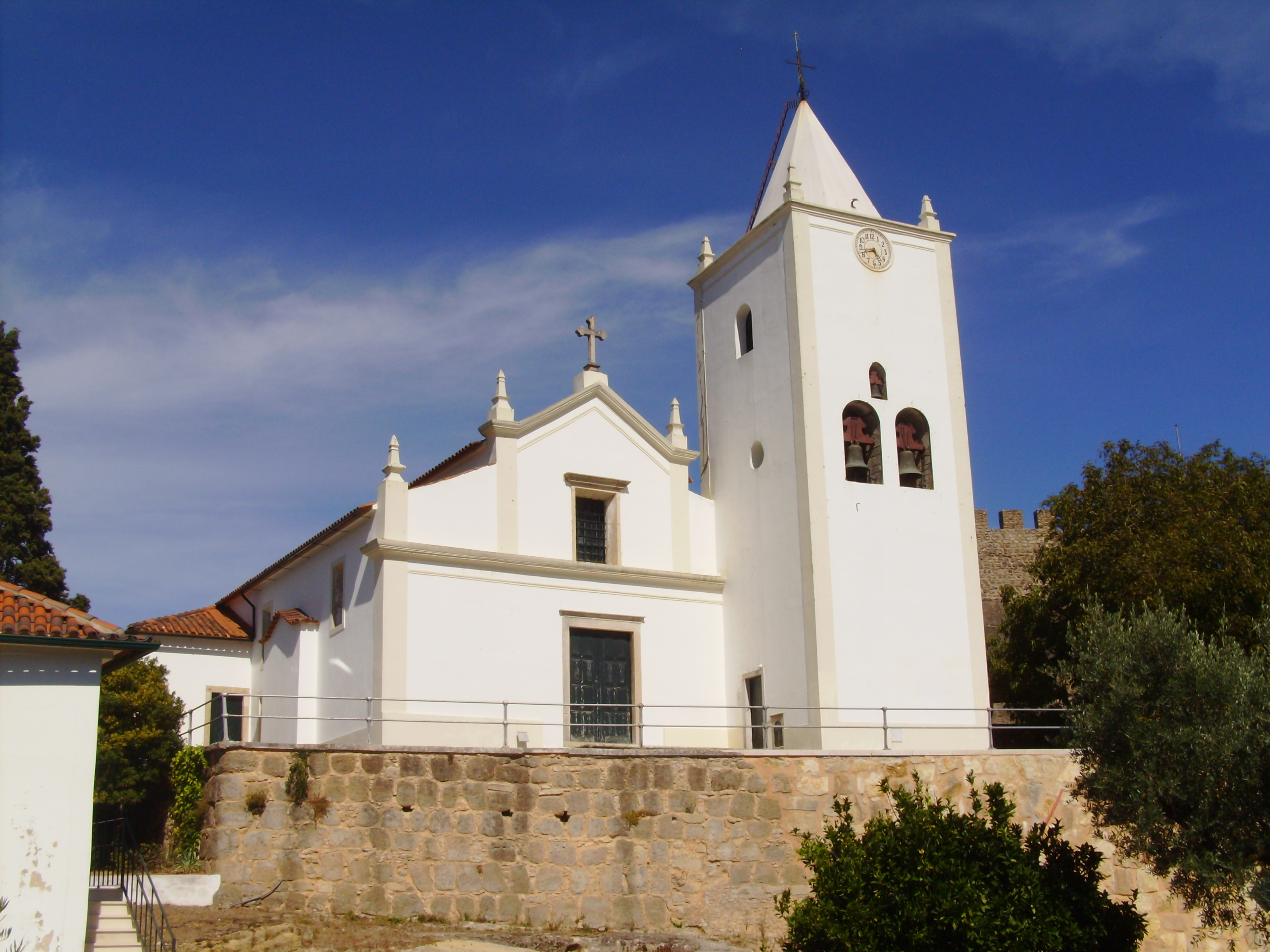 Castelo de Penela, freguesia de Santa Eufémia, concelho de Penela, distrito de Coimbra, Portugal: Igreja Matriz de São Miguel de Penela.